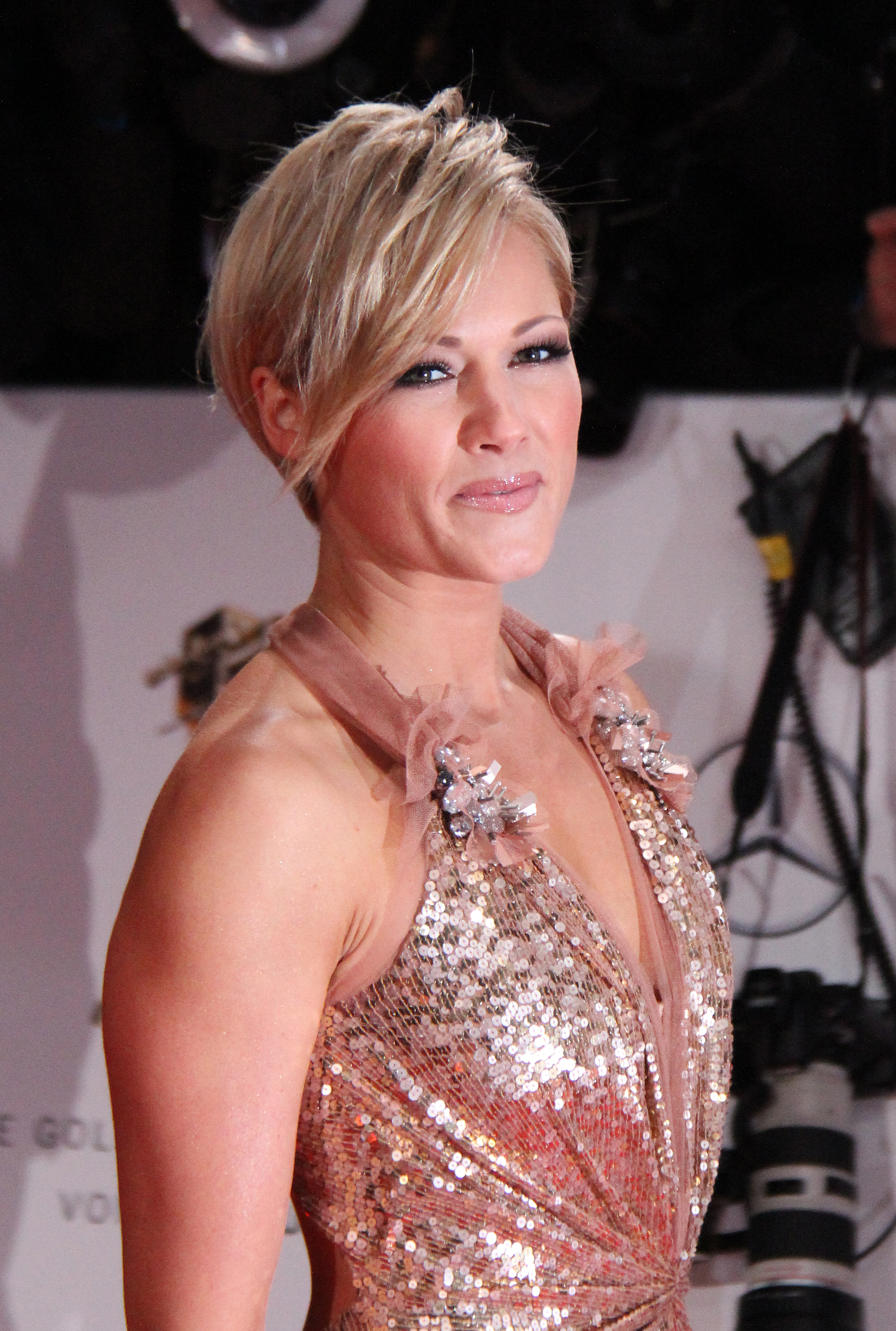 Helene Fischer bei der Goldenen Kamera 2012